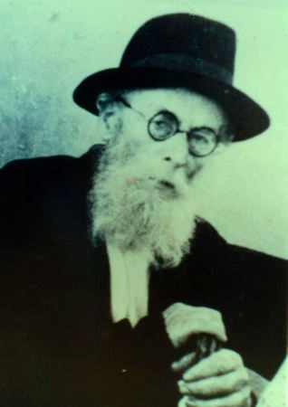 החזון איש, שנות ה-50